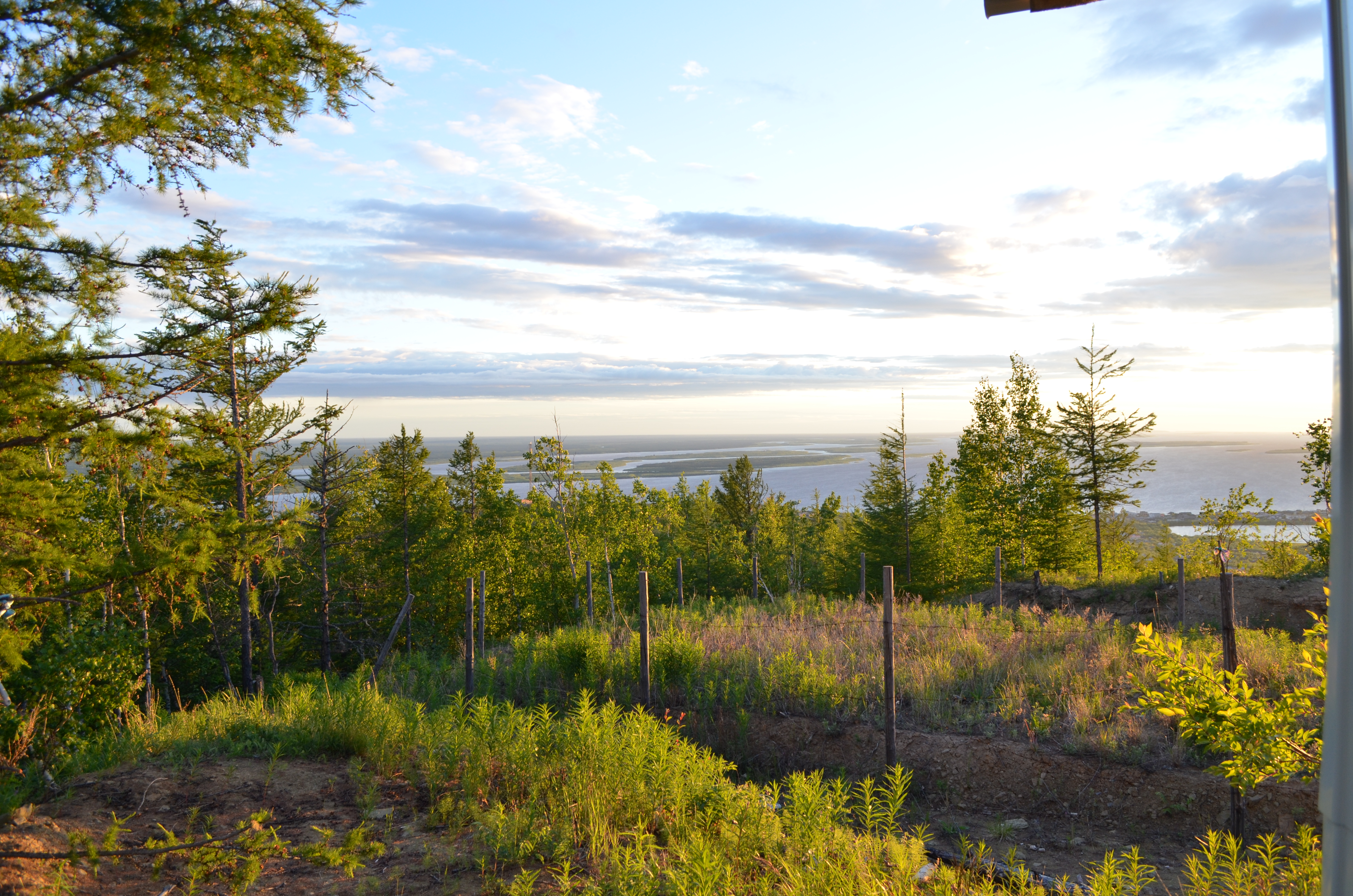 Поездка в Сангар 19-20.06.2016 на теплоходе Ракета-269